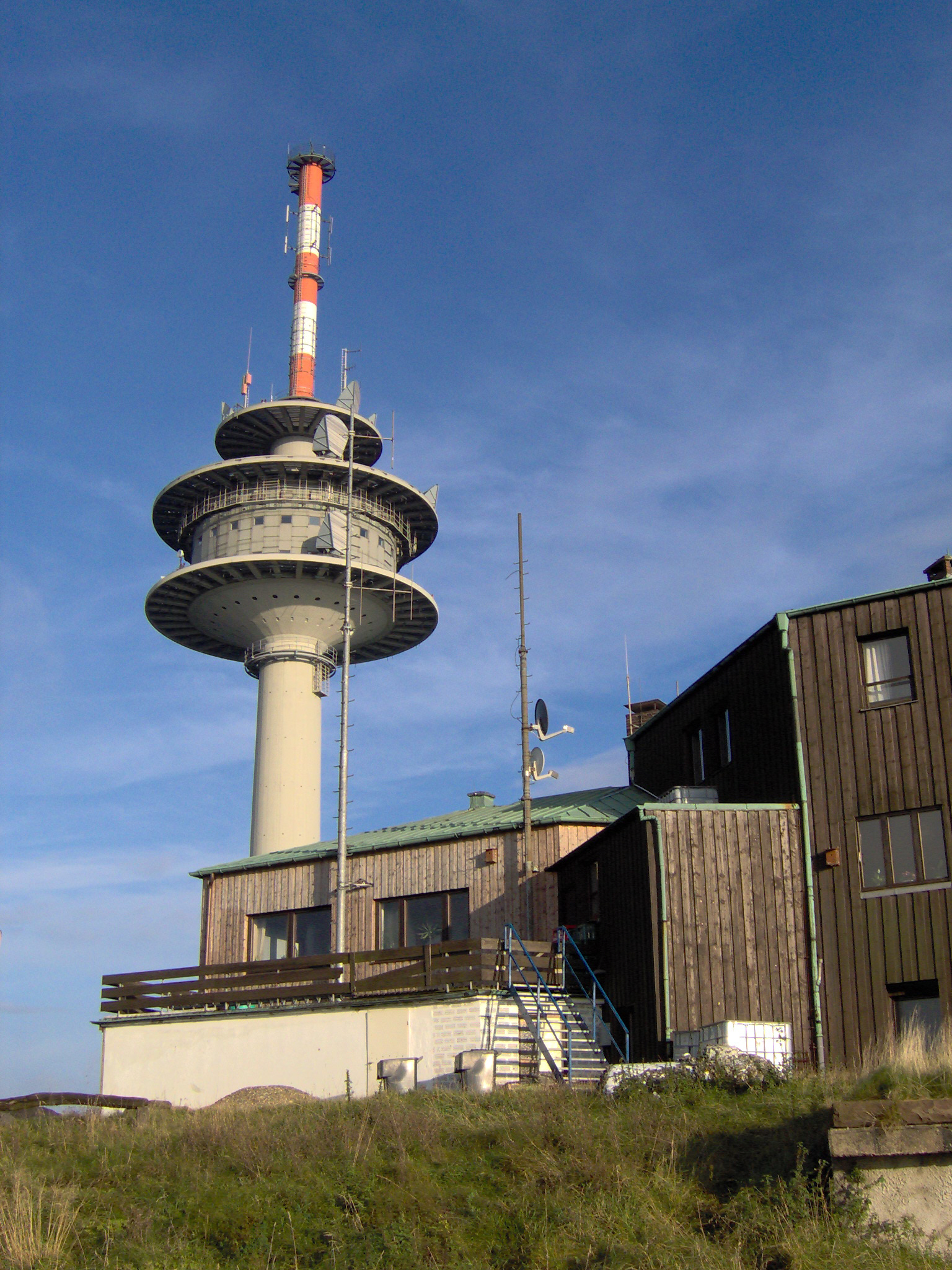 Köterberg mit Rundfunkturm am 3. Oktober 2005.